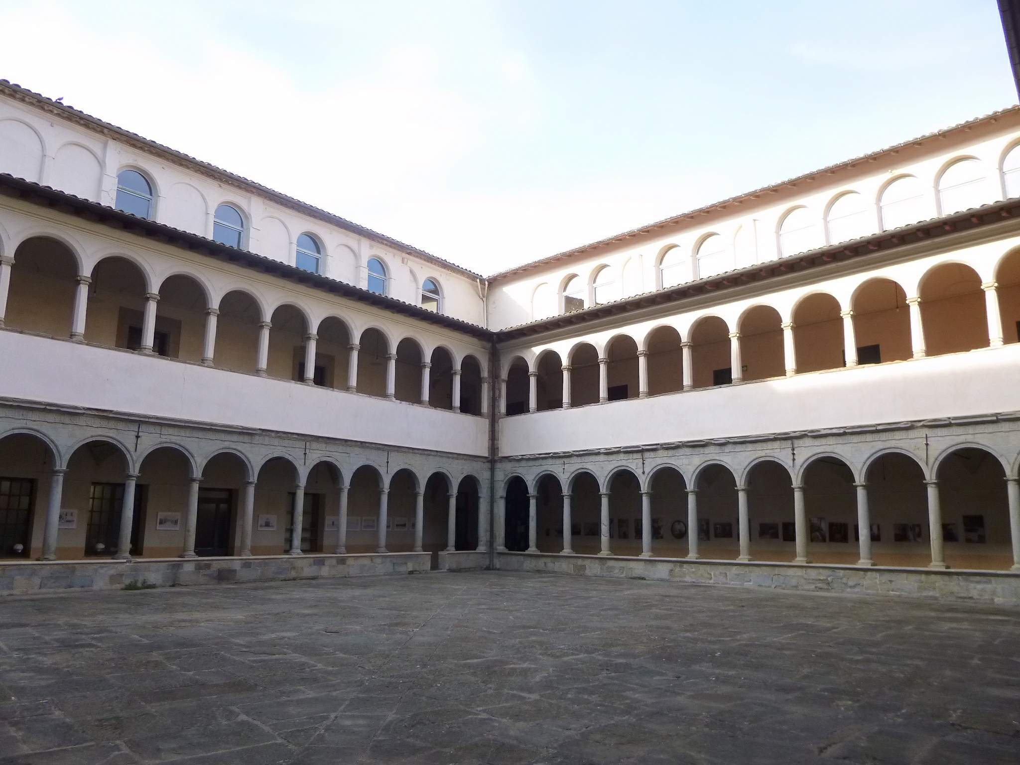 Claustro de antiguo Convento del Carme (Olot, Girona)